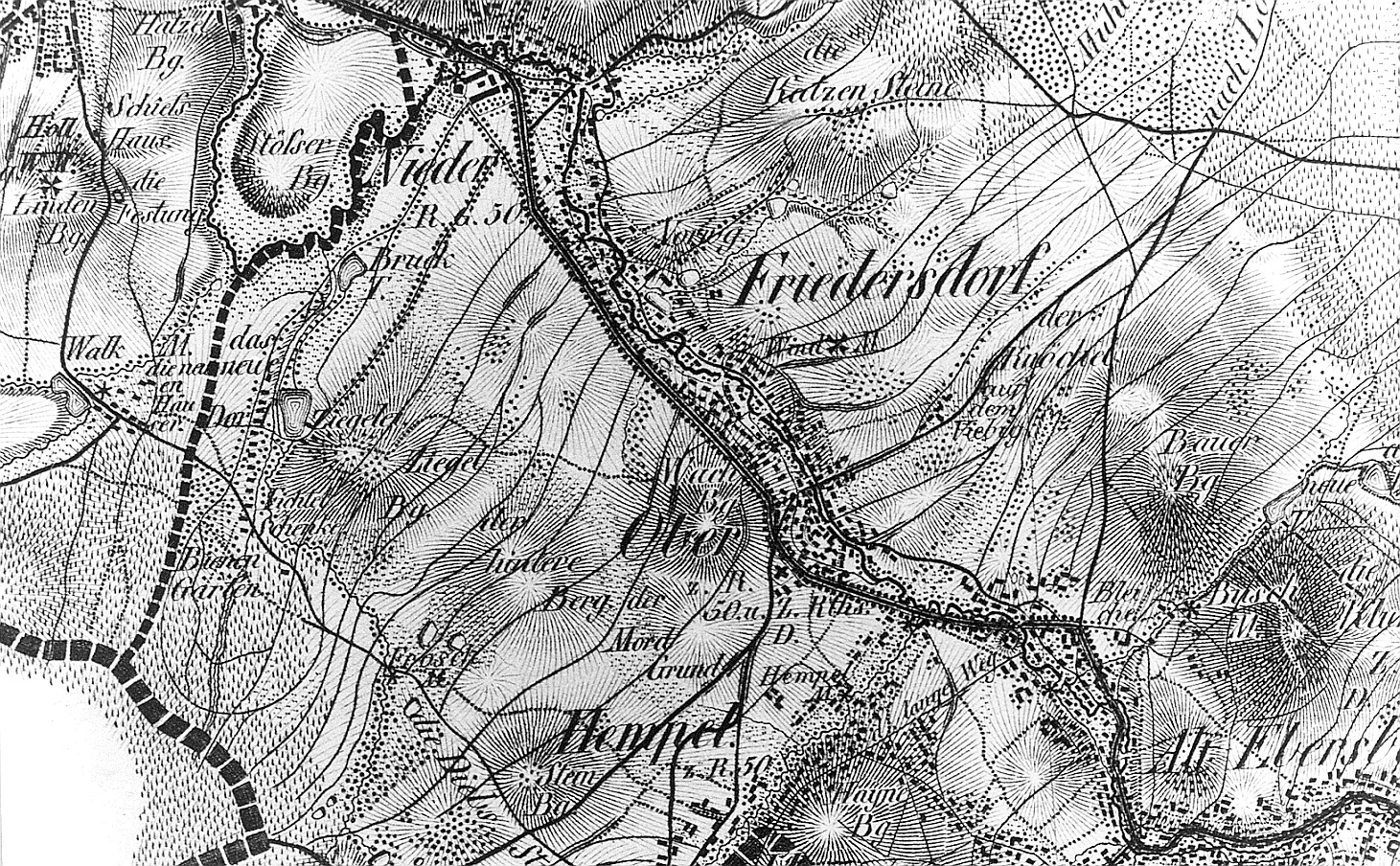 Original image description from the Deutsche Fotothek Friedersdorf. Oberreit, Sect. Stolpen, 1821/22